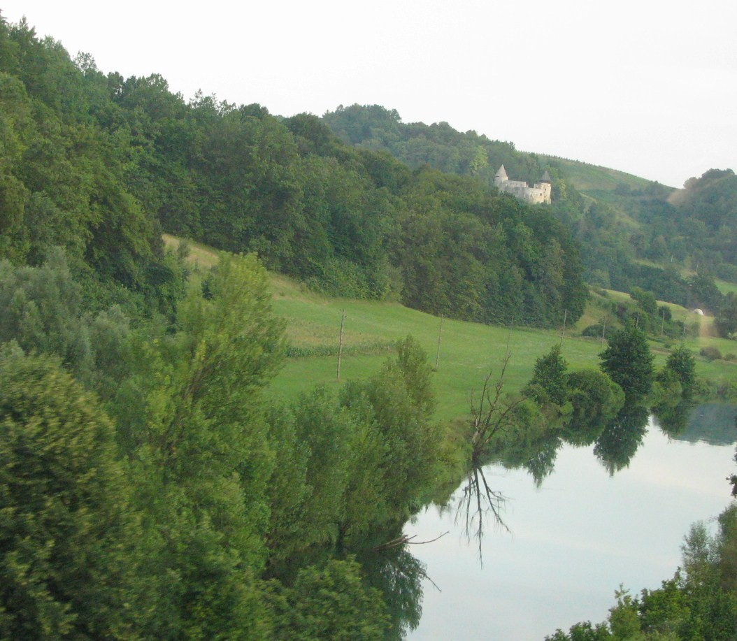 Rijeka Dobra i Stari grad Novigrad na Dobri